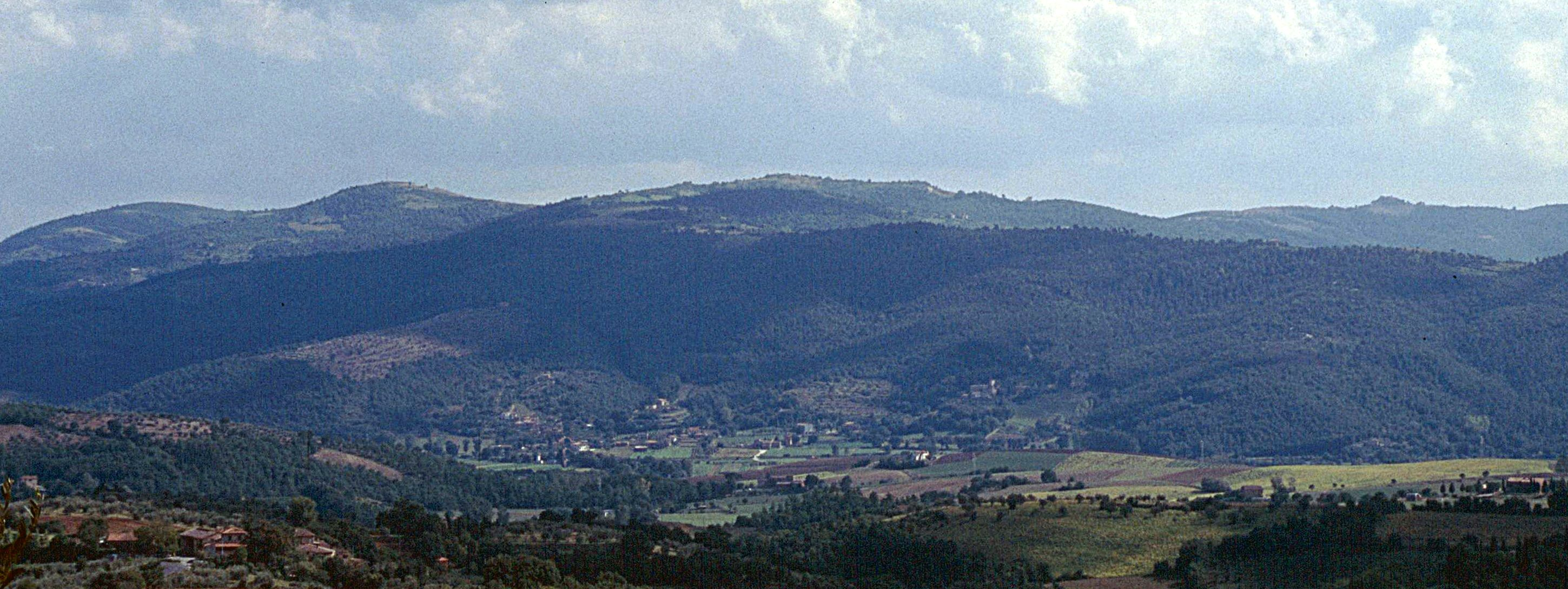 Valle del Nestòre